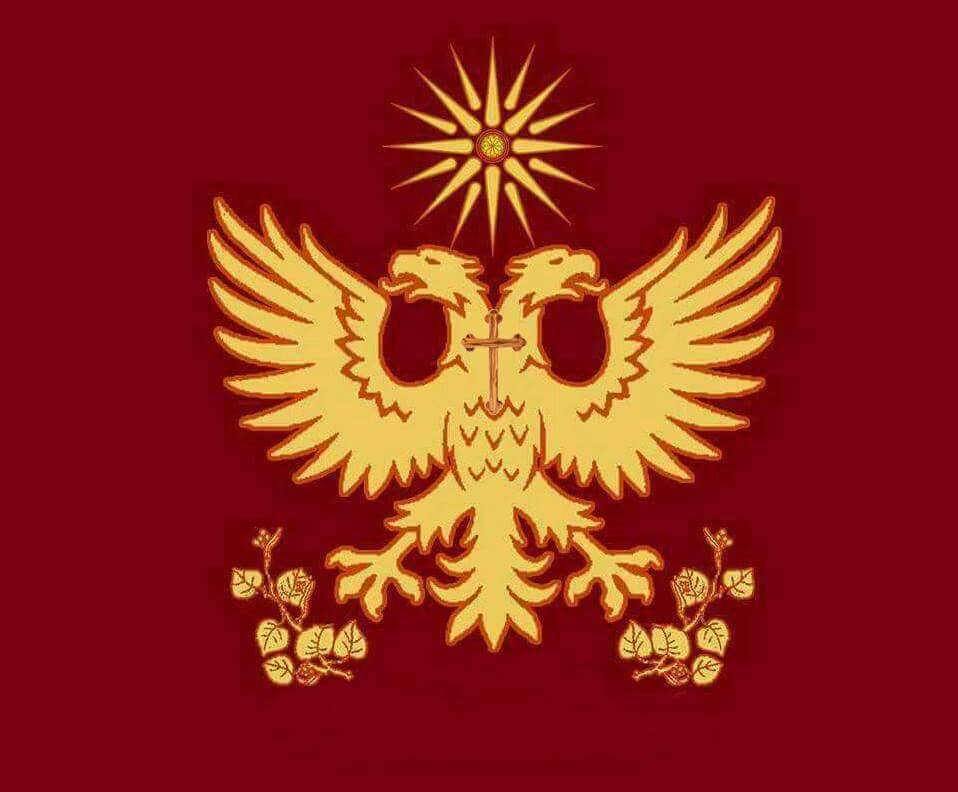 Flambura Rrãmãsca